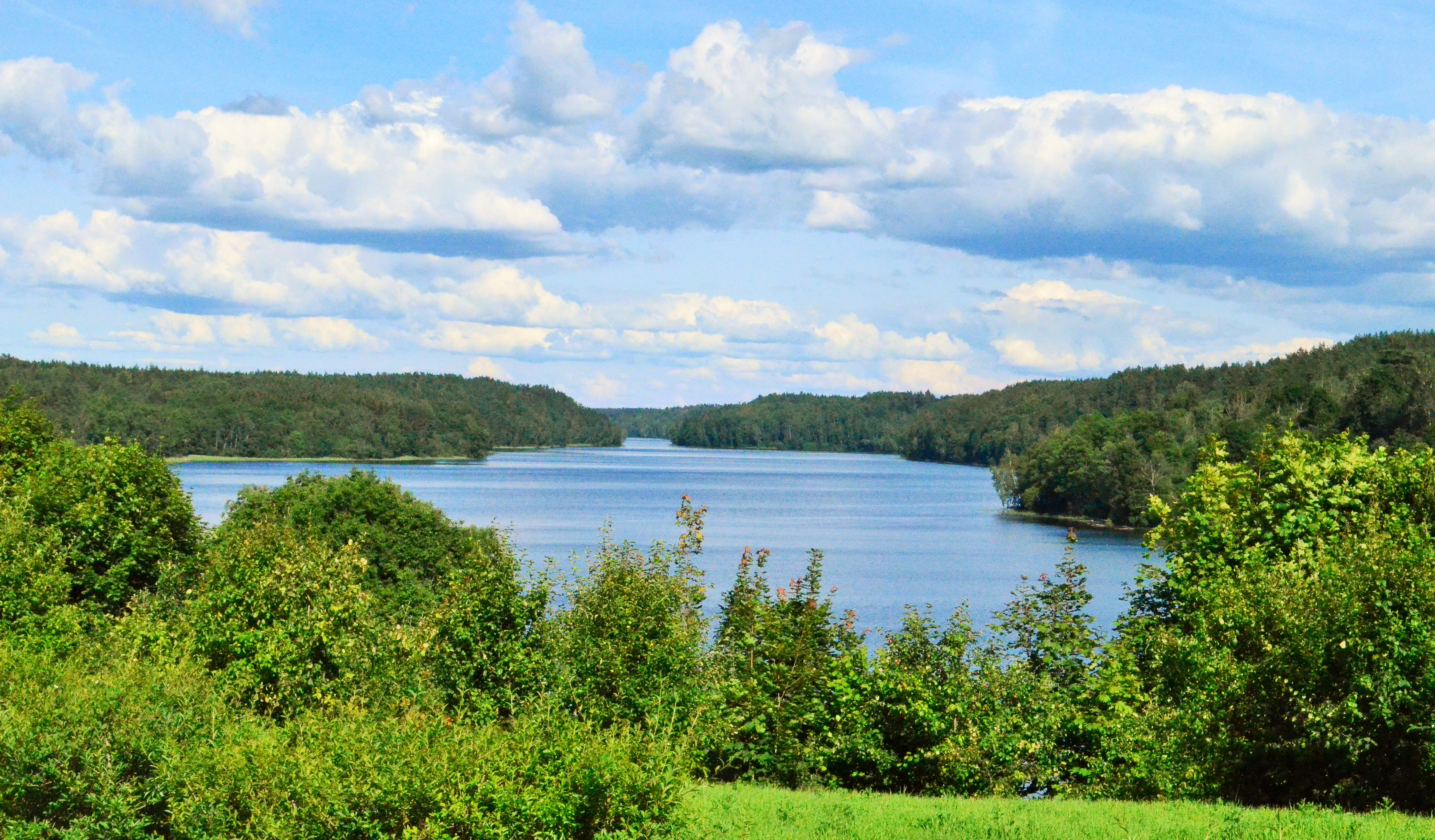 Ežeras Asveja žvelgiant iš Žalktynės, Molėtų raj.